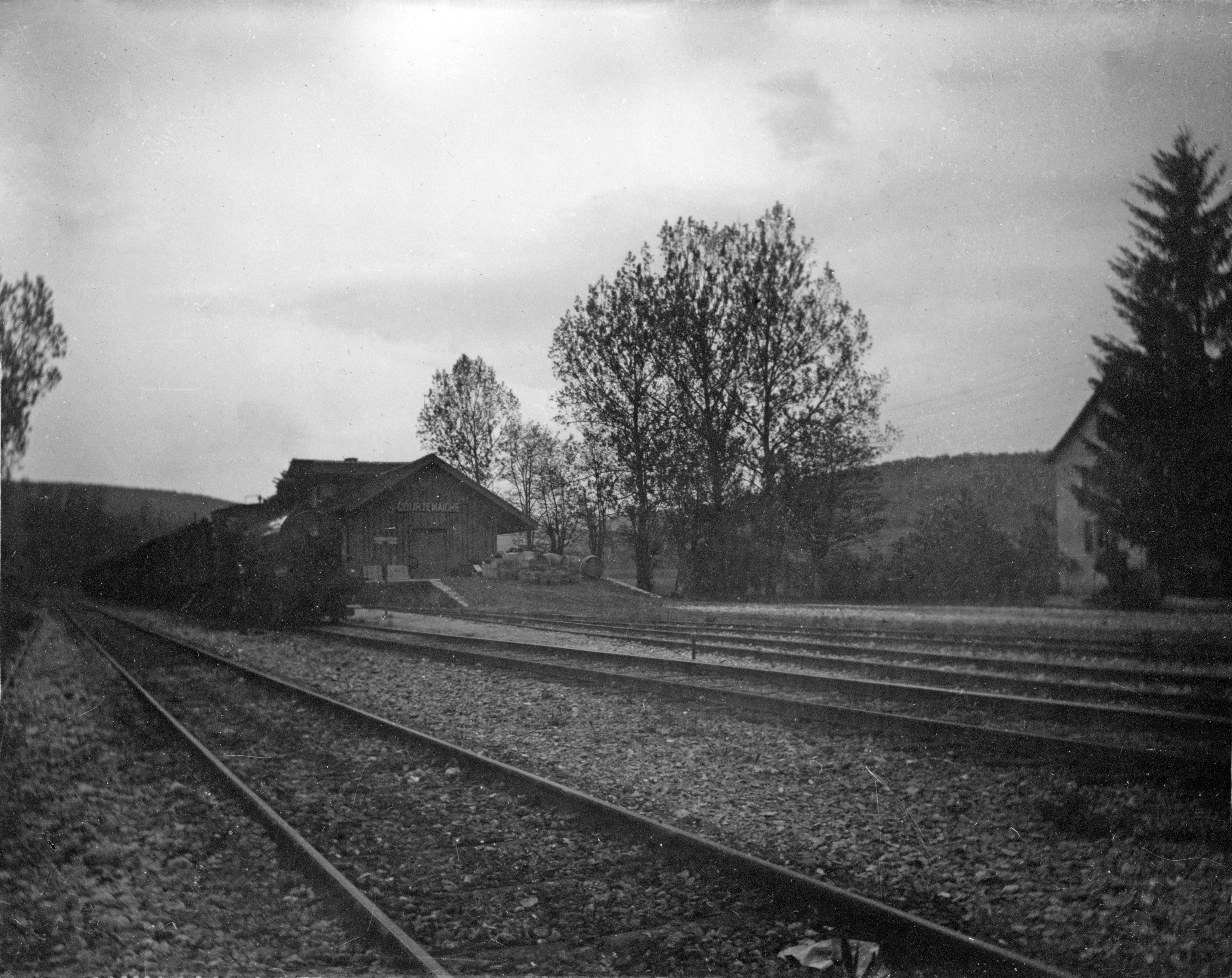 Passage d'un train en gare de Courtemaîche dans le Jura Suisse.